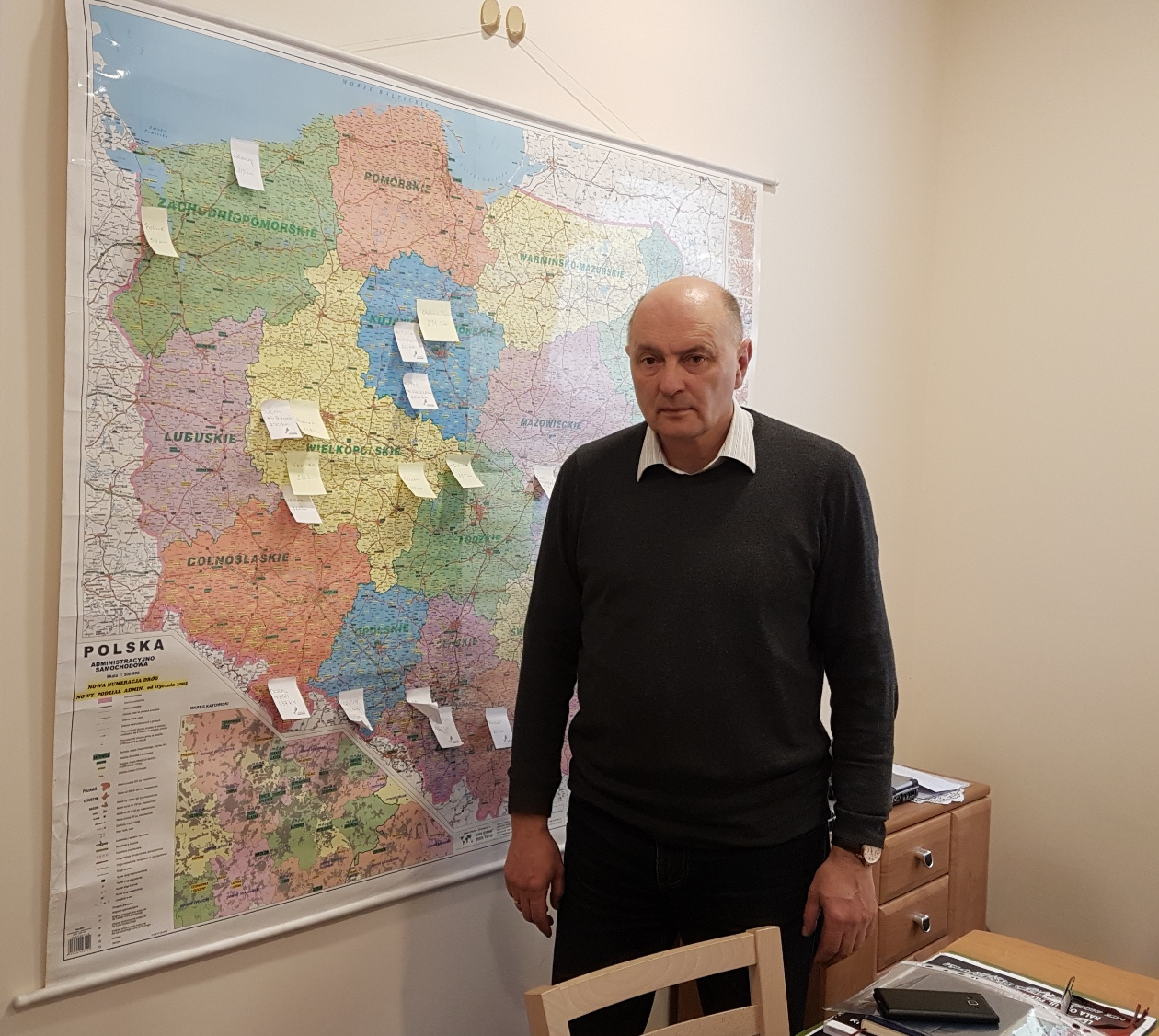 Stargard, 04.05.2017r. Prezes Spójni Tadeusz Gutowski